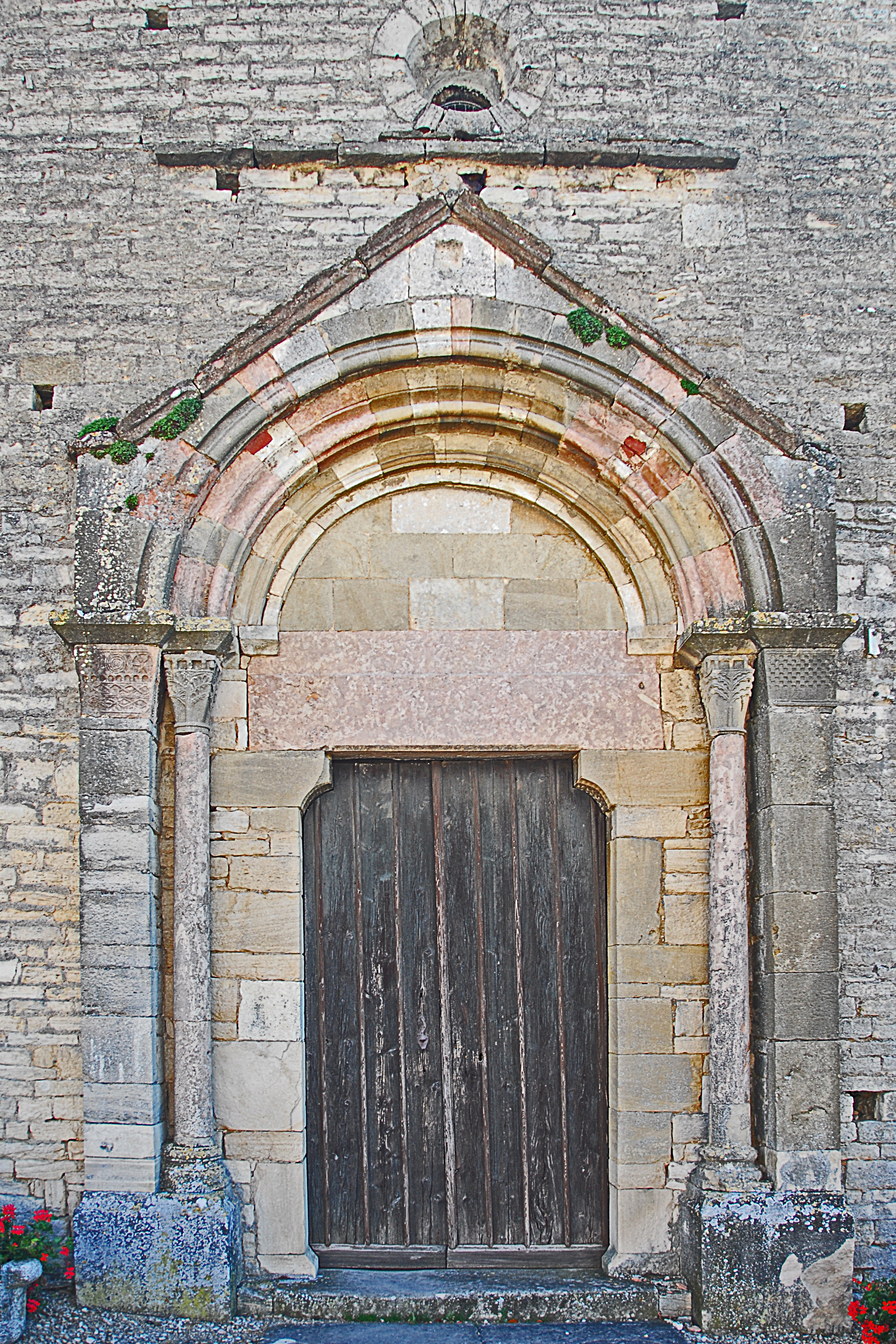 St-Bathélémy, Farges, Hauptportal